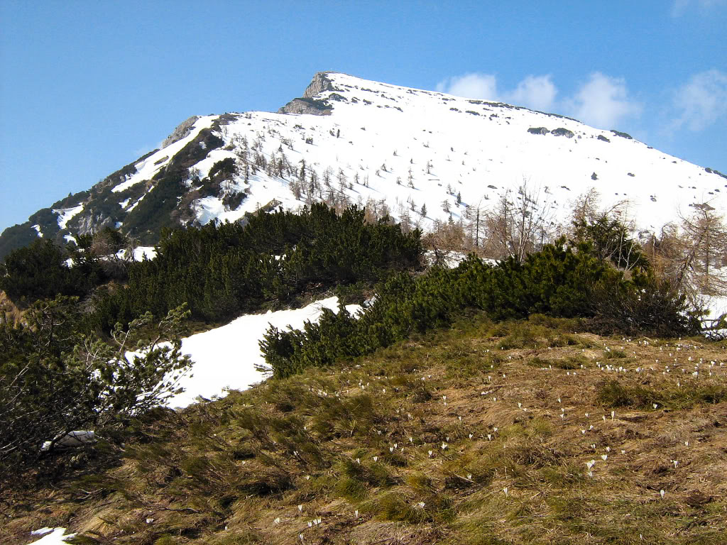 vista cima Stivo dal sentiero 608